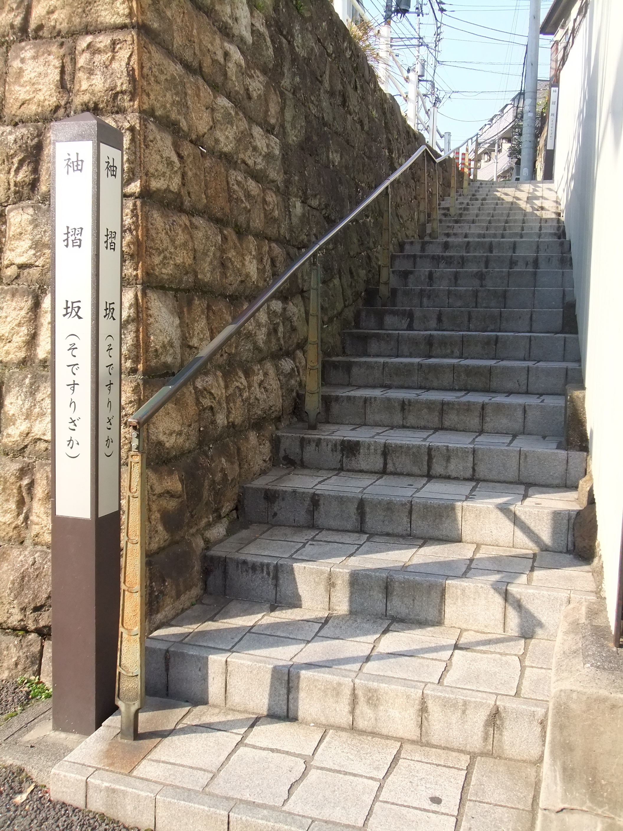 袖摺坂 (牛込・神楽坂)